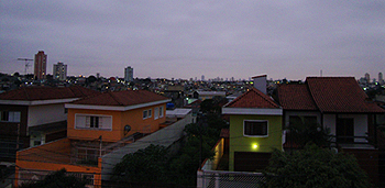 Foto aérea Jd Popular